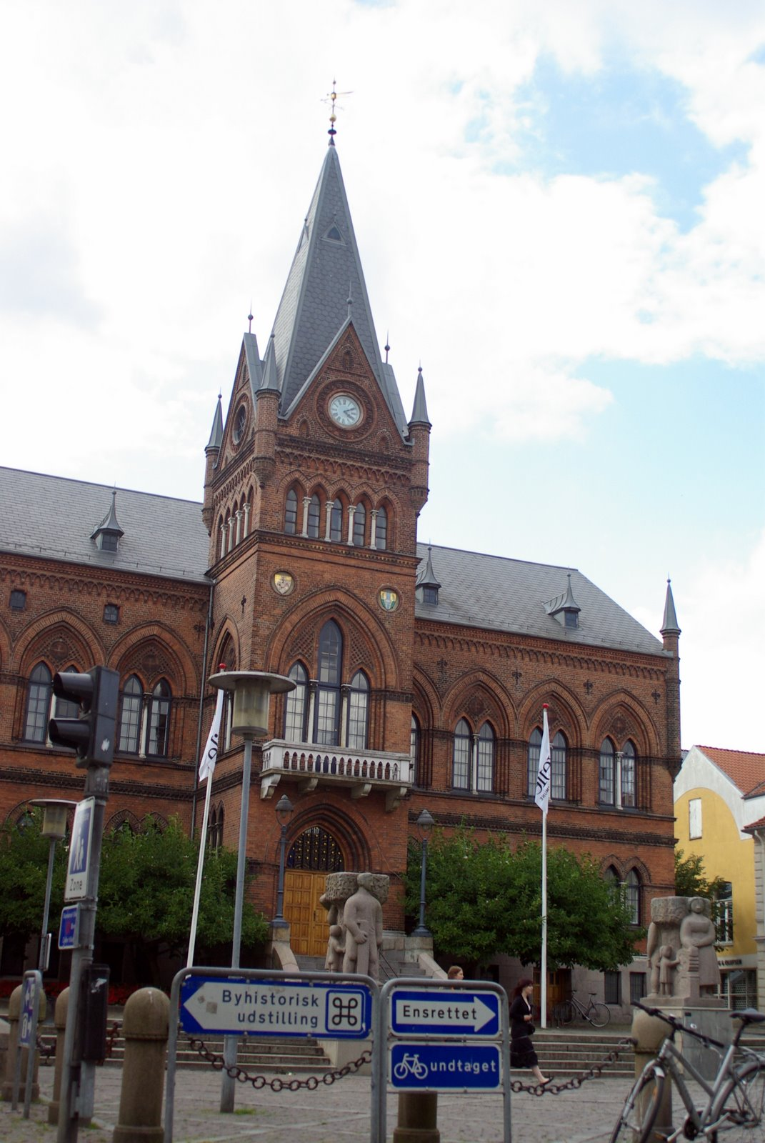 Vejle raekoda veelkord